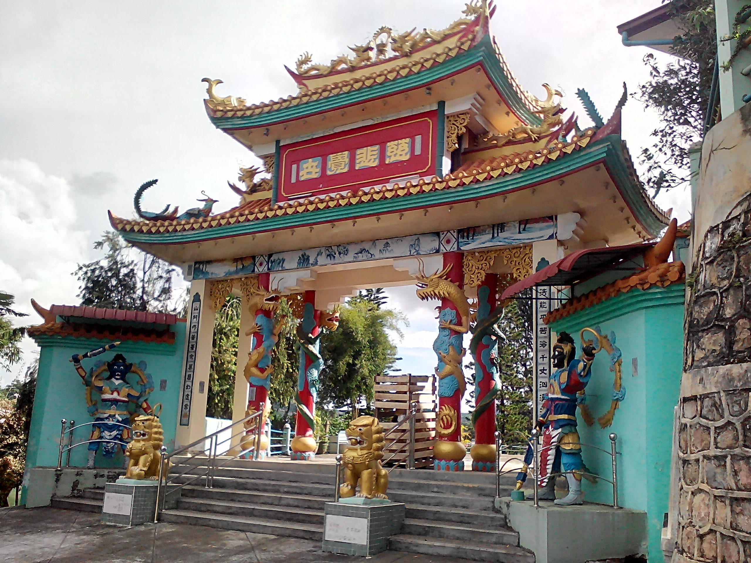 Мьянма. Таунджи. Китайський храм